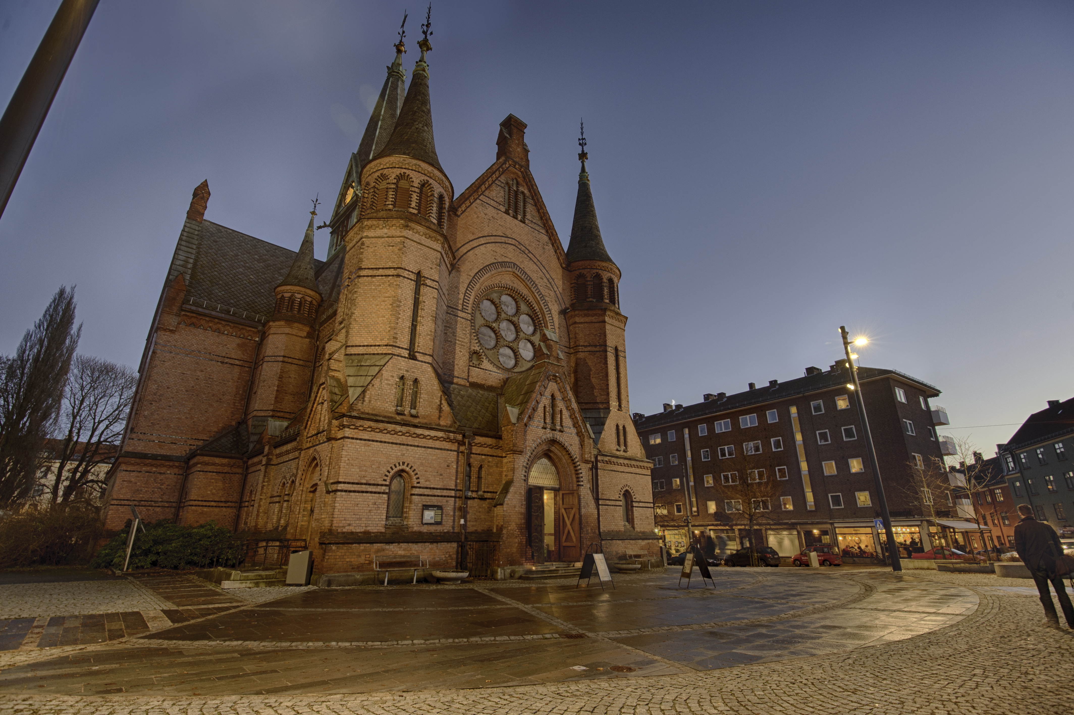 Sagene kirke sett fra gaten.